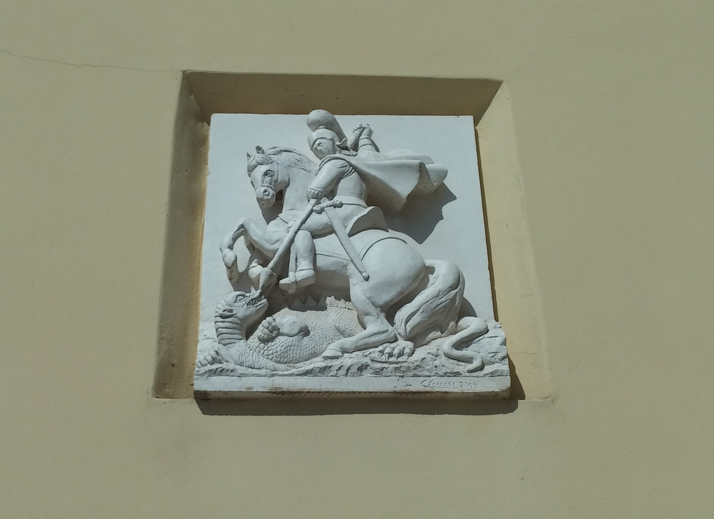 Particolare di edicola cittadina che ricorda il santo patrono San Giorgio